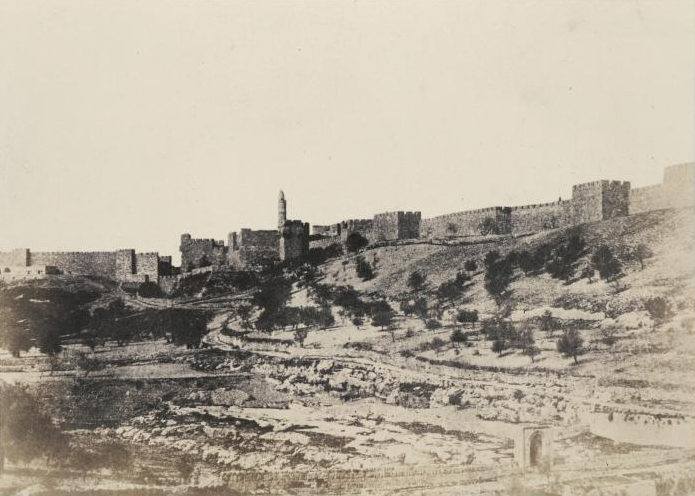 Birket-es-Soultan - Jerusalem.